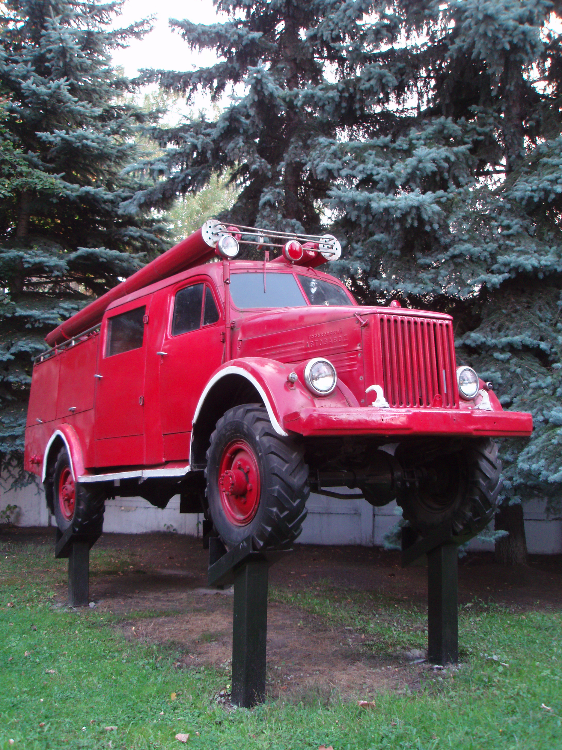 Пожарная модификация ГАЗ-63 ПМГ-19 на постаменте в Люберцах.